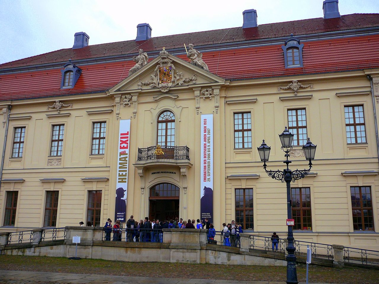 Das Kollegienhaus, ein Teil des Jüdischen Museums BerlinJewish History Museum